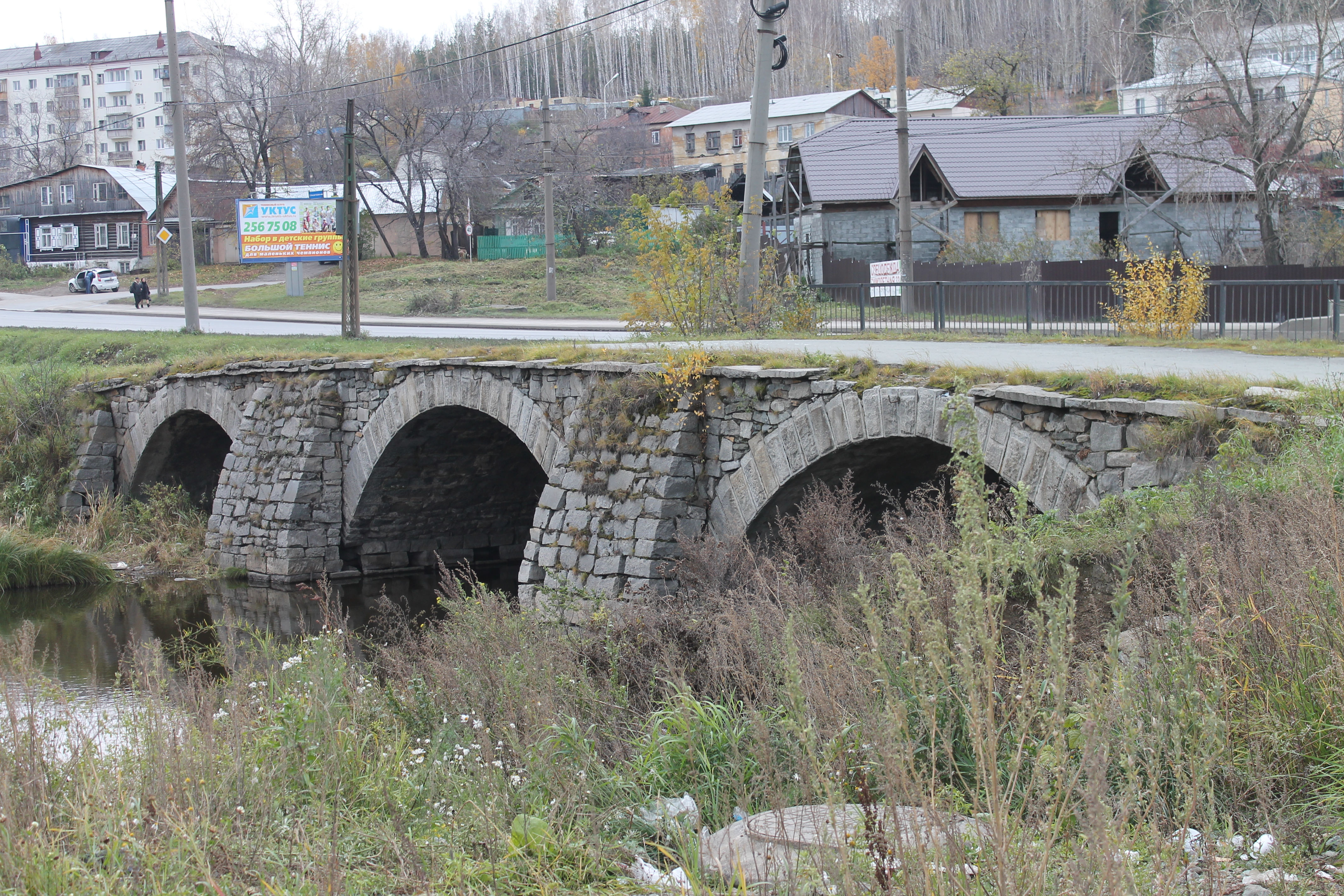 Мост через реку Патрушиха (Свердловская область, Екатеринбург, Щербакова улица)